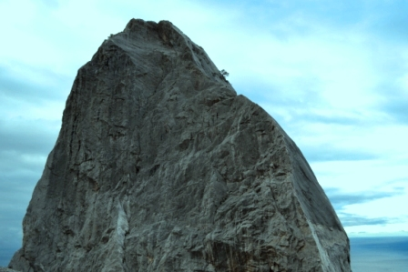 Зуб Морчеки (крупно)